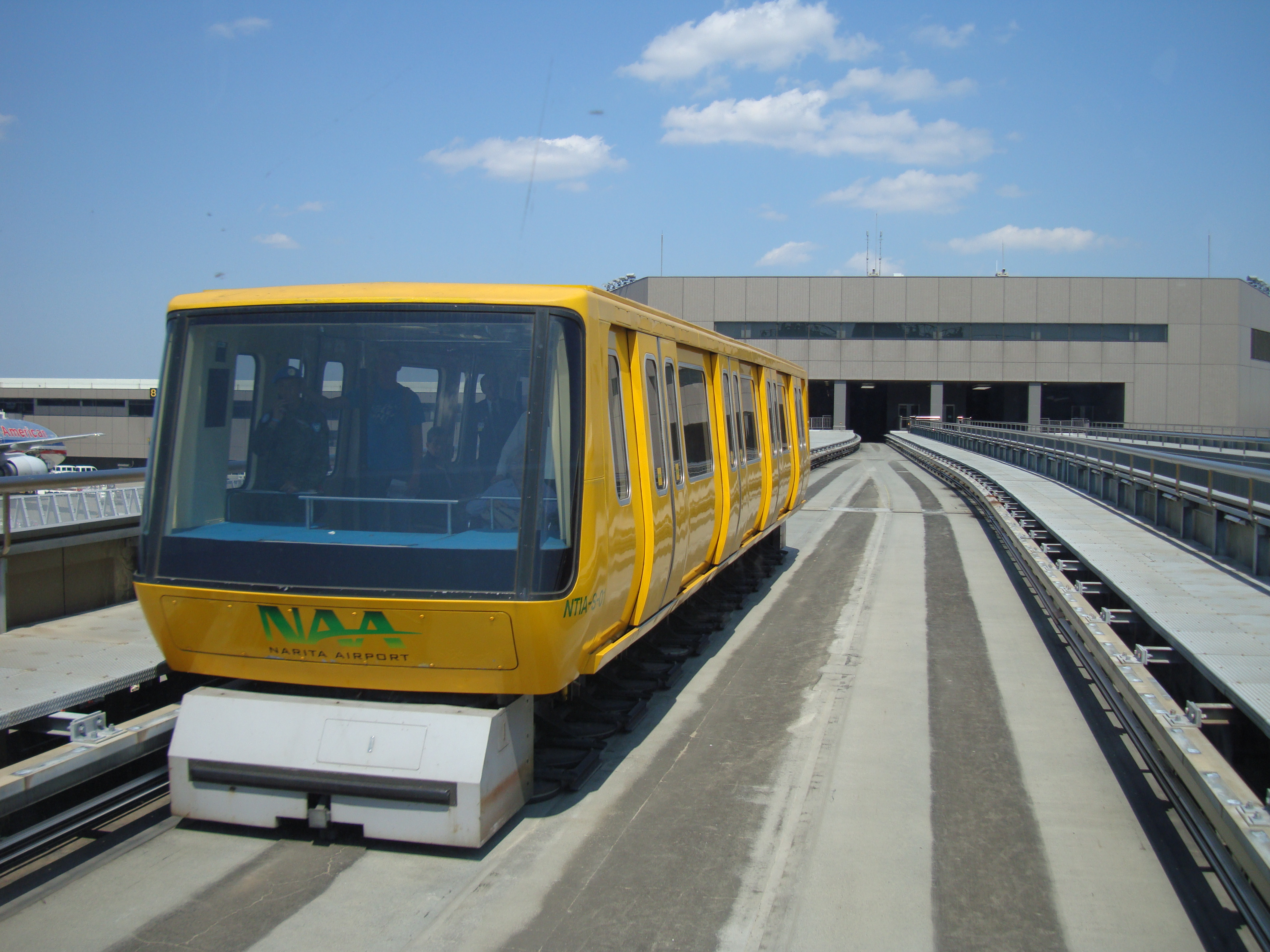 NARITA Air port